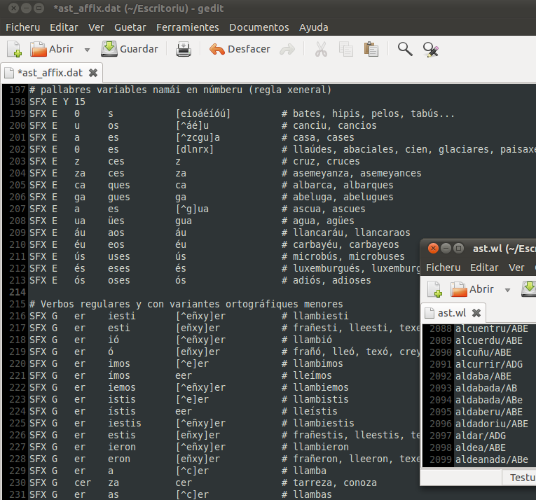 códigu fonte del aspell en llingua asturiana